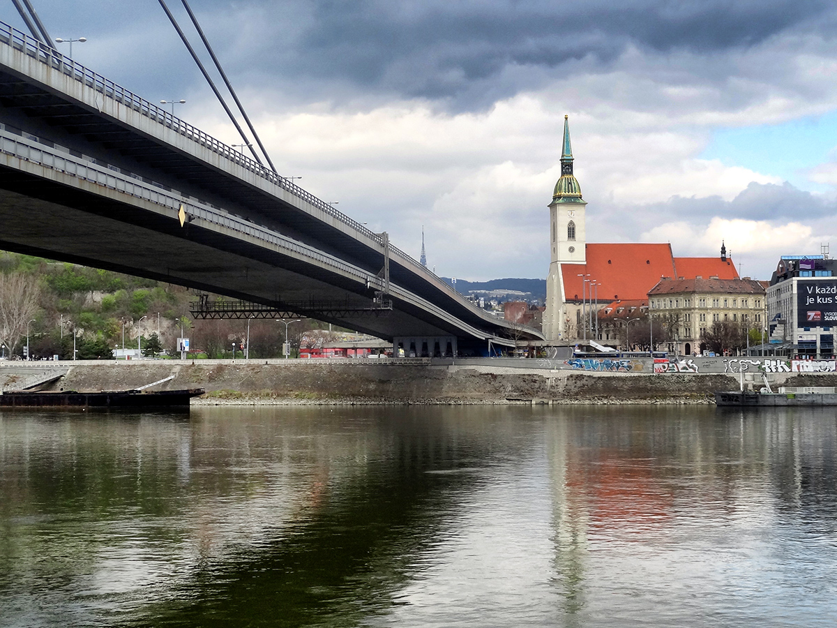 Вид на старый город